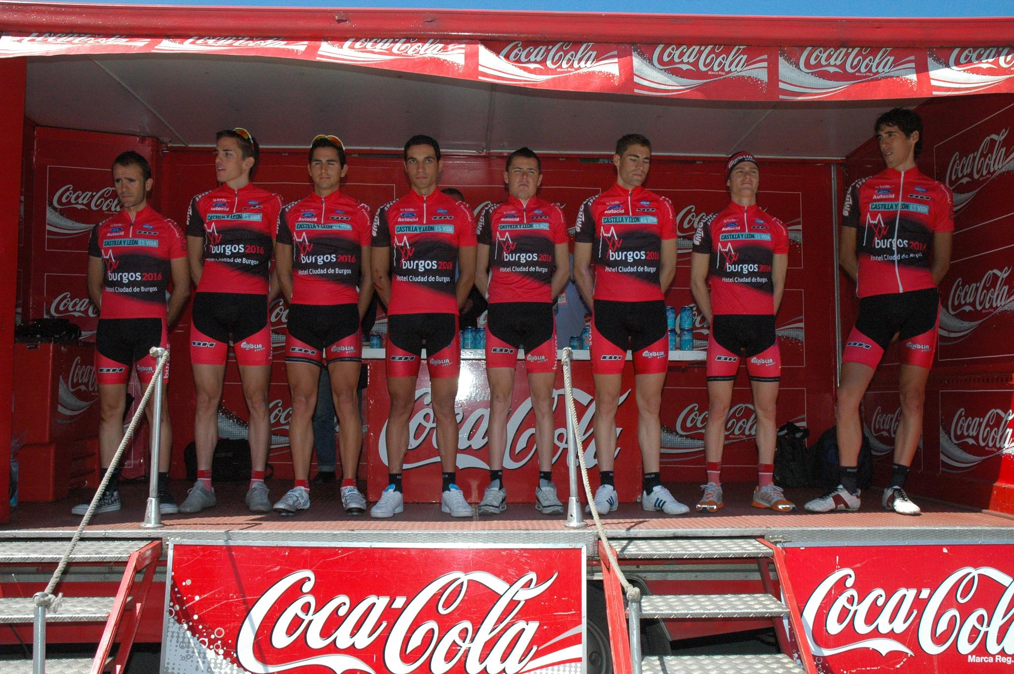 Burgos Monumental, Euskal Bizikleta 2008